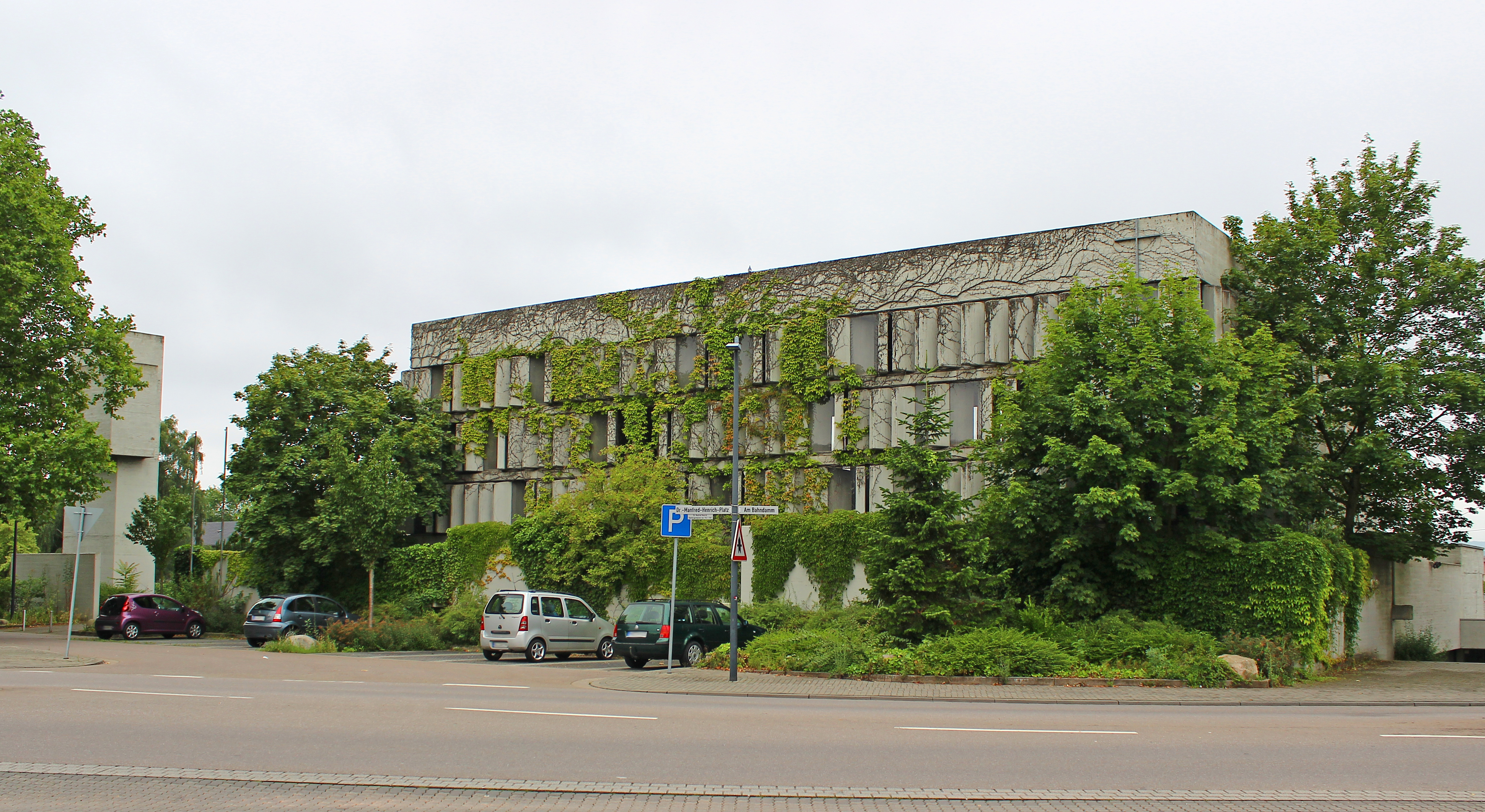 Kath. Kirche Christkönig in Saarlouis-Roden, Saarland